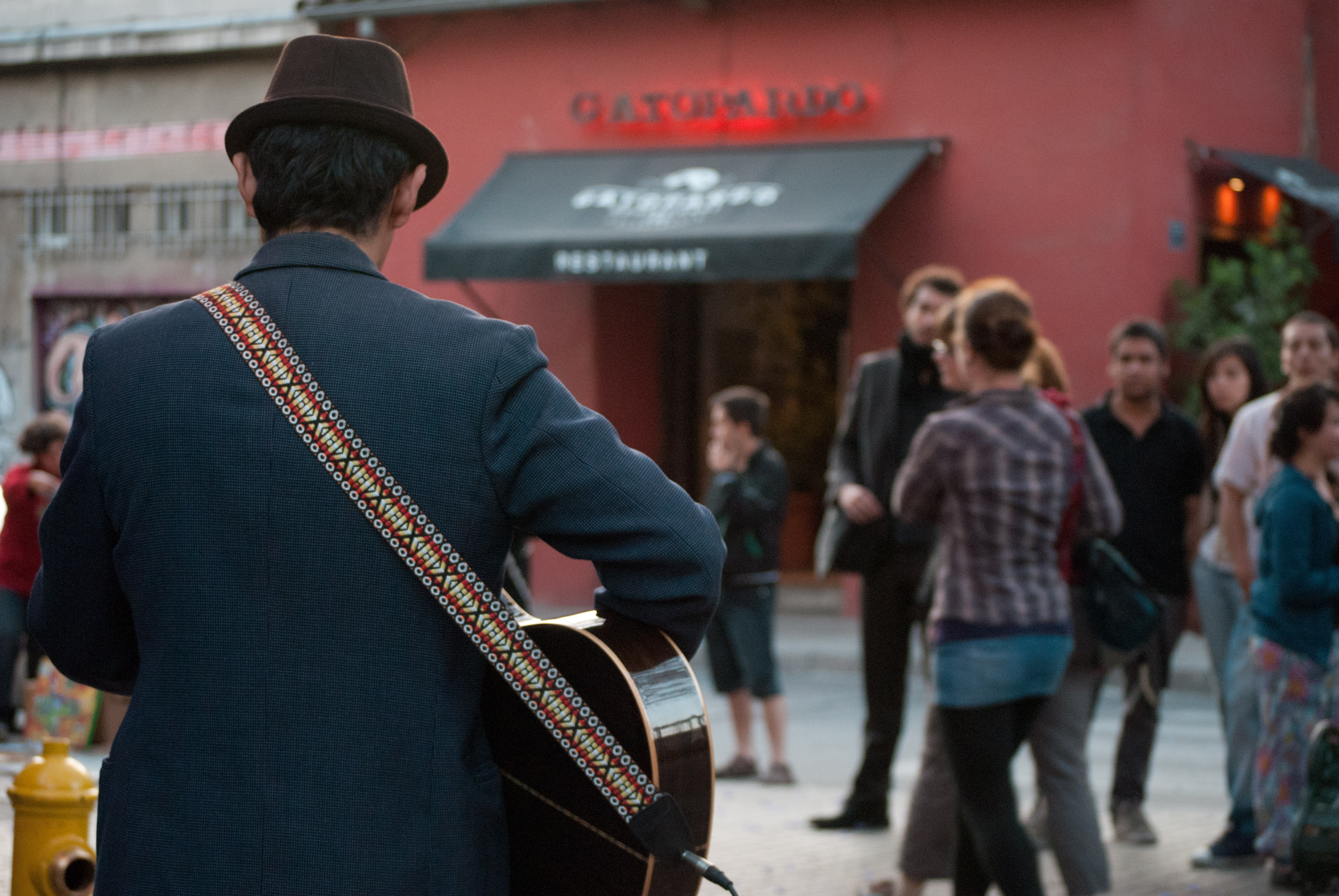 Mientras él guitarreaba. Hoy, en Lastarria.